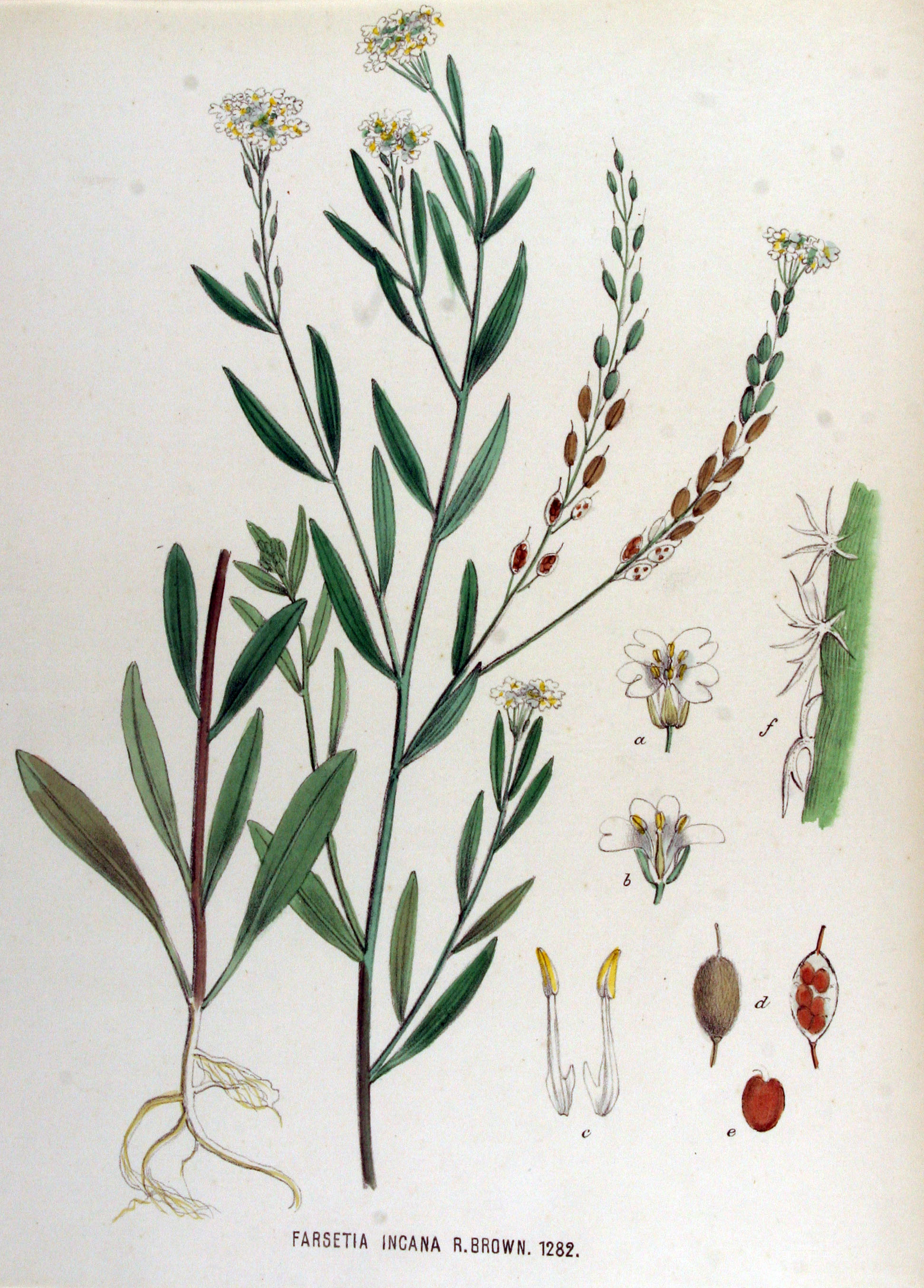 Berteroa incana (L.) DC. (Syn. Farsetia incana (L.) W.T. Aiton)